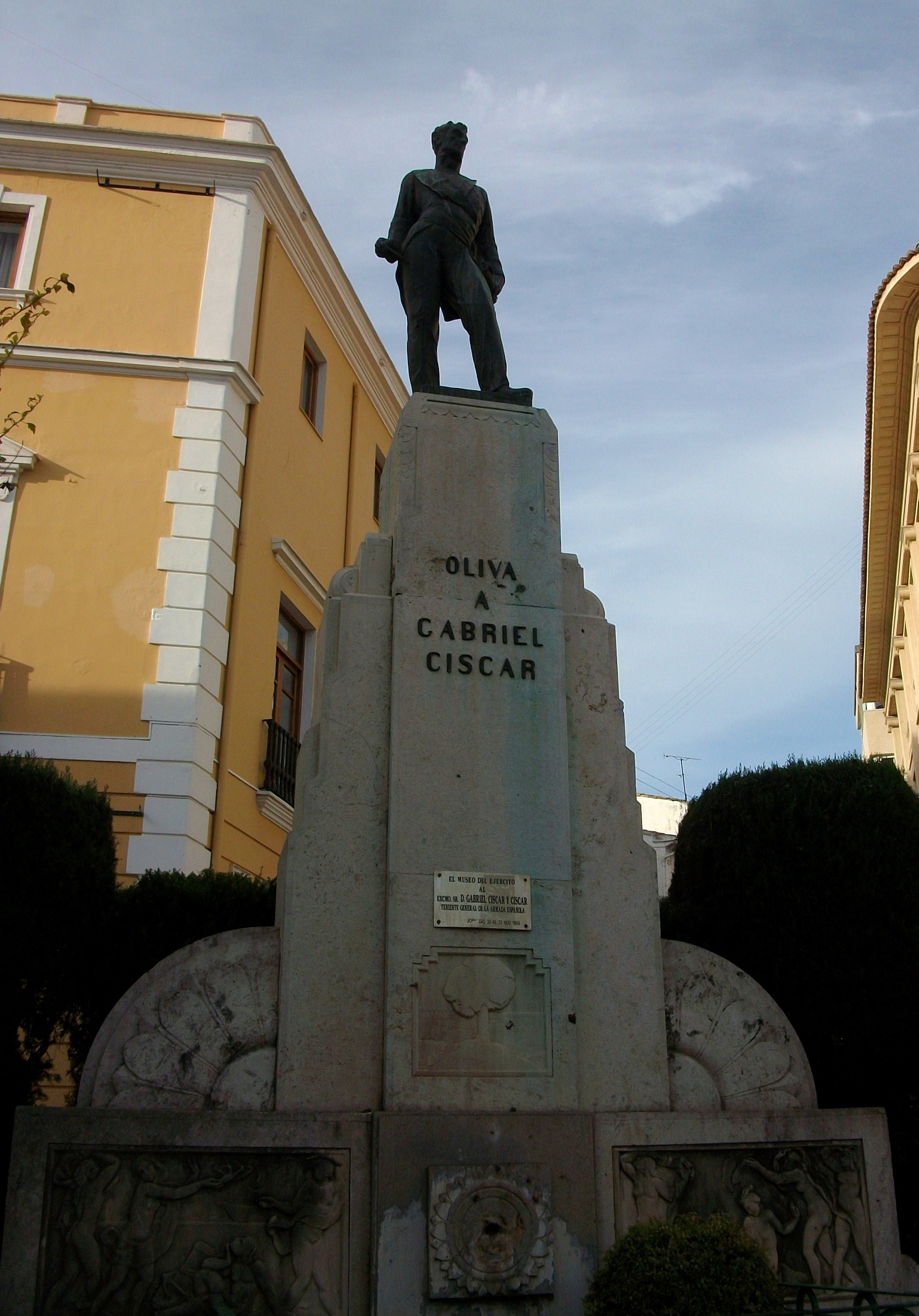 Monument a Gabriel Ciscar, Oliva.